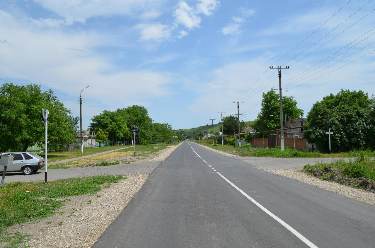 Поход на гору Джуца, 23.06.2019